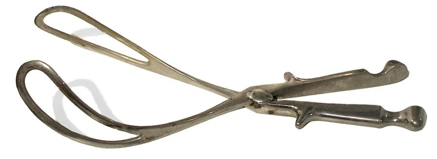 Verlostang (Tang van Naegele). Foto Ed Stevenhagen, aug 2005.